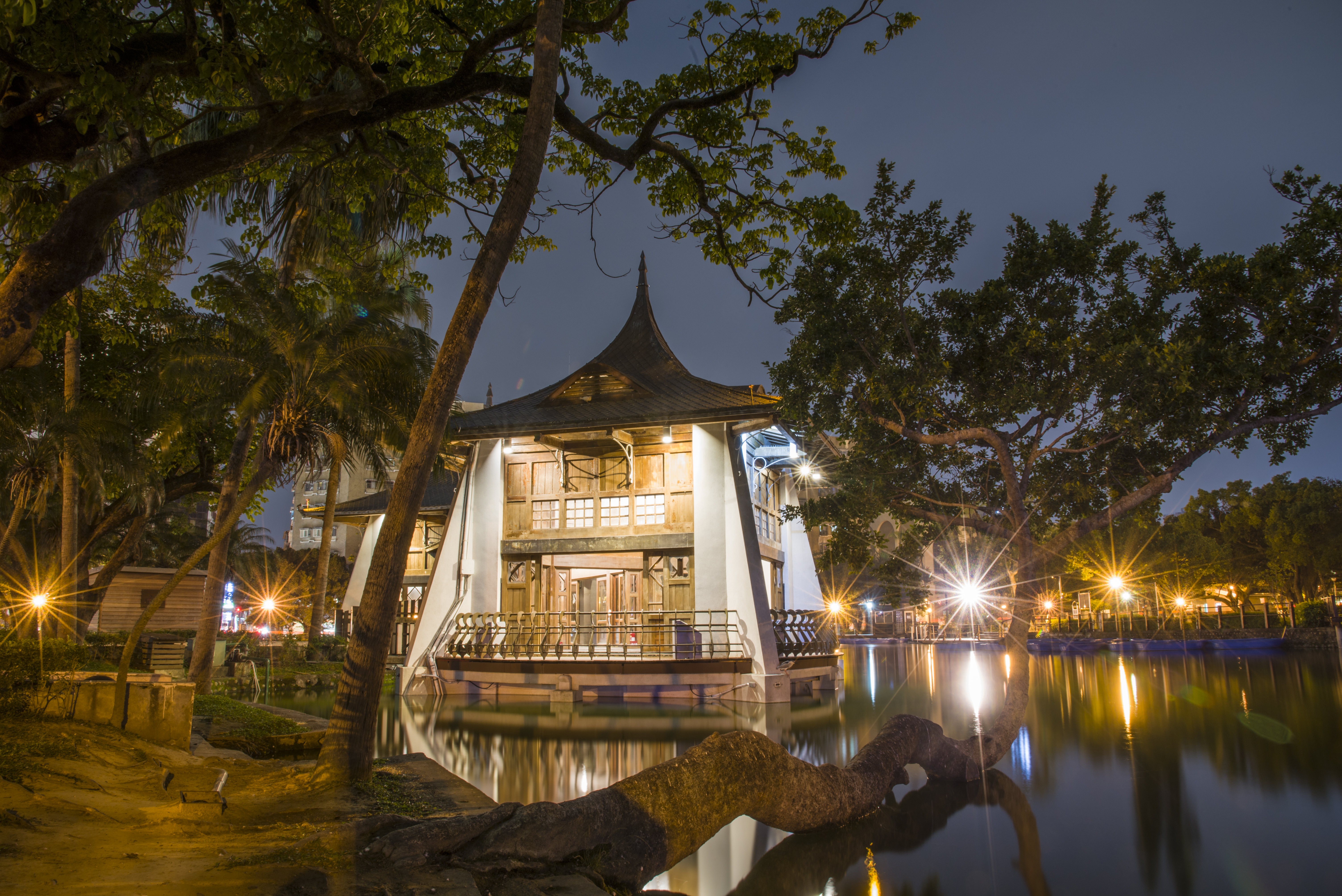 中文（台灣）: 幽靜的中山公園湖心亭